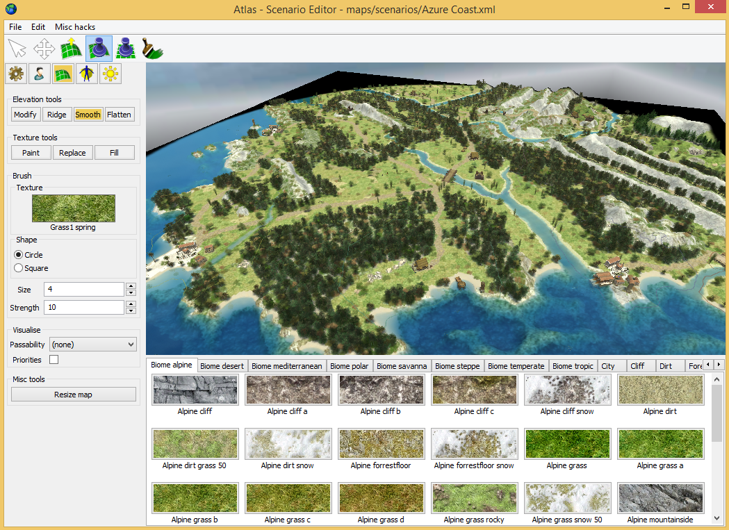 0 A.D. map editor "Atlas"